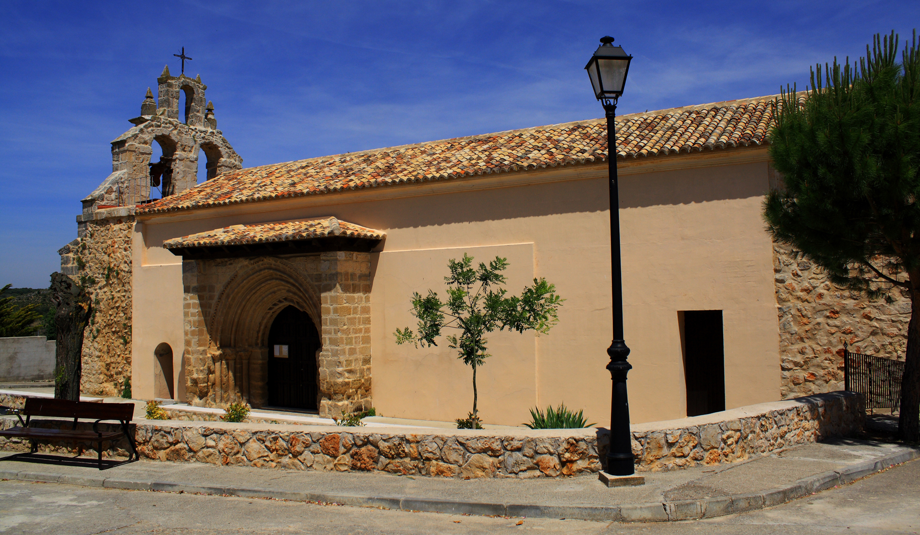 Iglesia de Nuestra Señora de la Asunción, en el municipio de Escopete, Guadalajara, España.